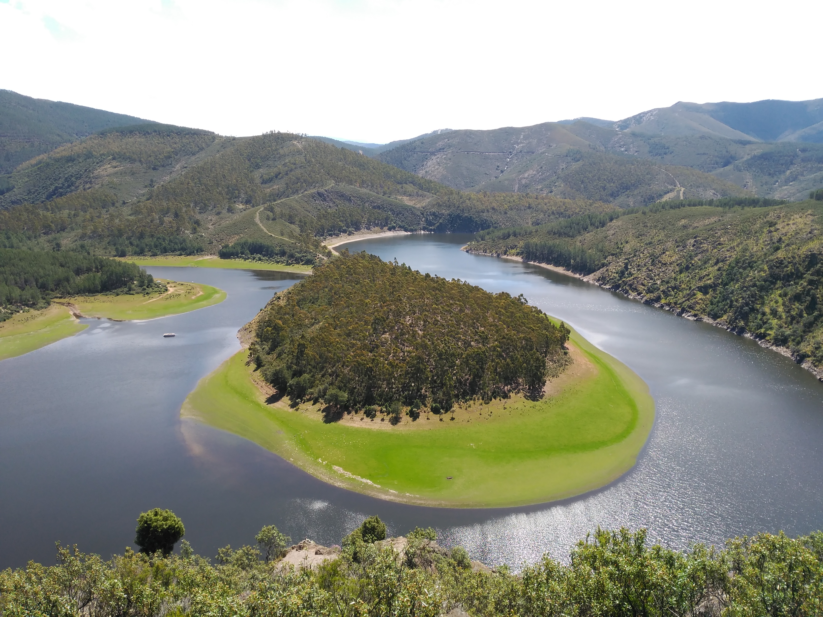 Riomalo de Abajo, Las Hurdes, Extremadura (España)